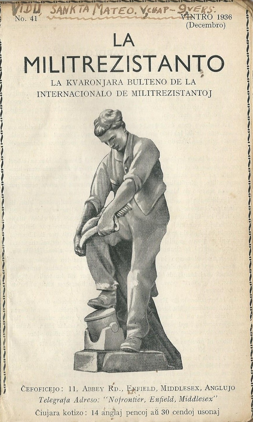 Revuo el 1936 : La militrezistanto